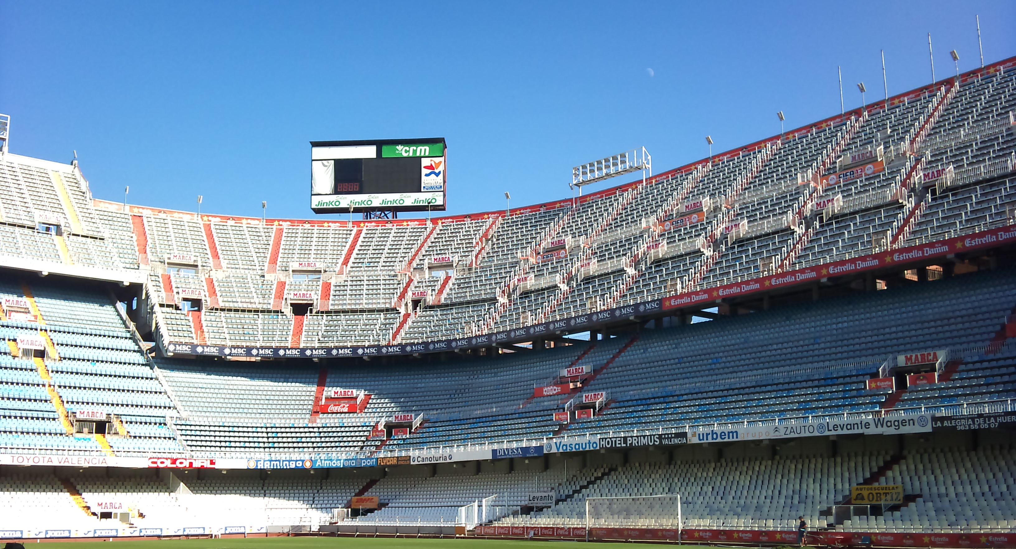 Grades de Mestalla